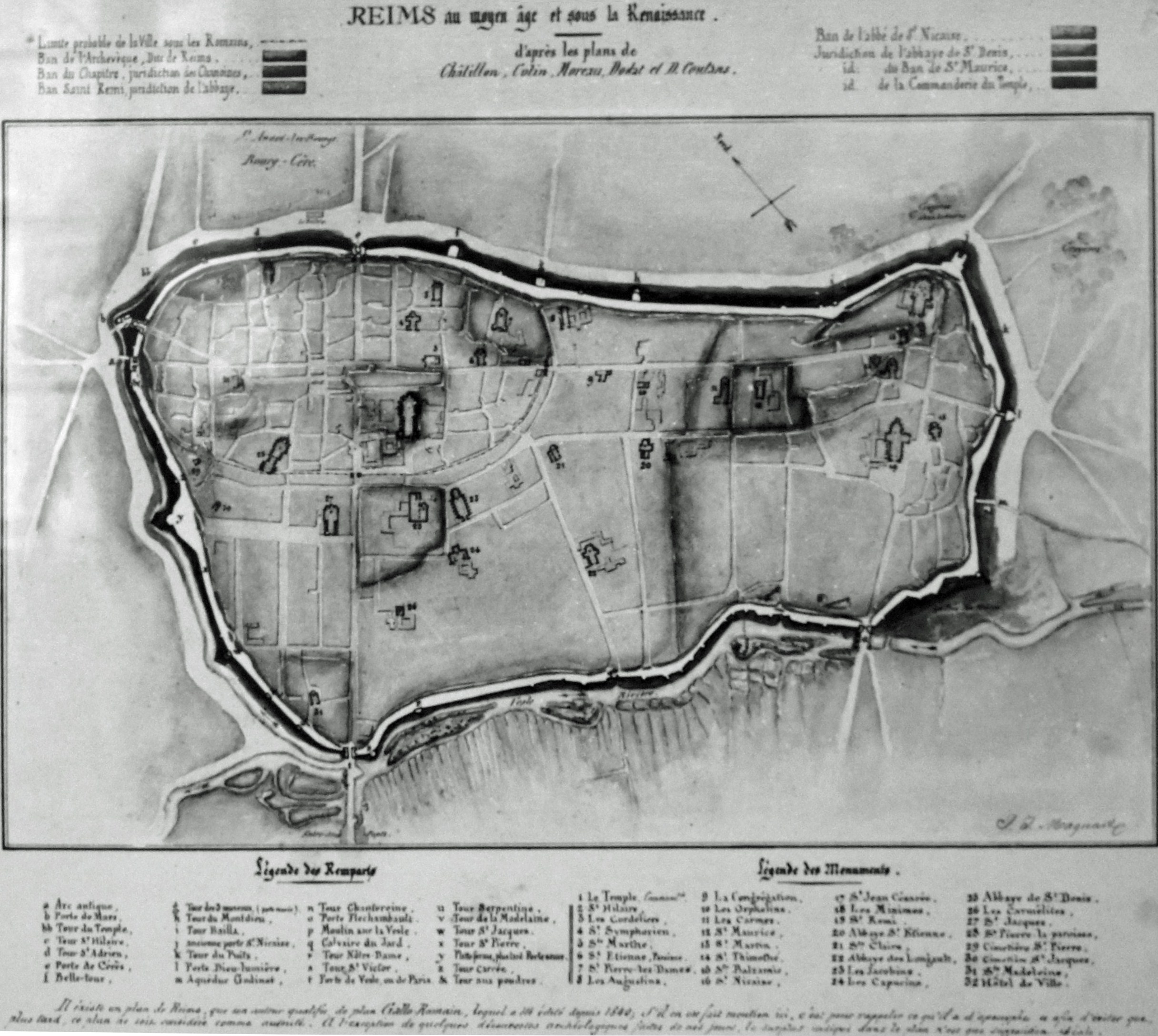 Enceinte fortifiée de Reims plan réalisé par J.J. Maquart, vers 1850, sur la base de plans préexistant.